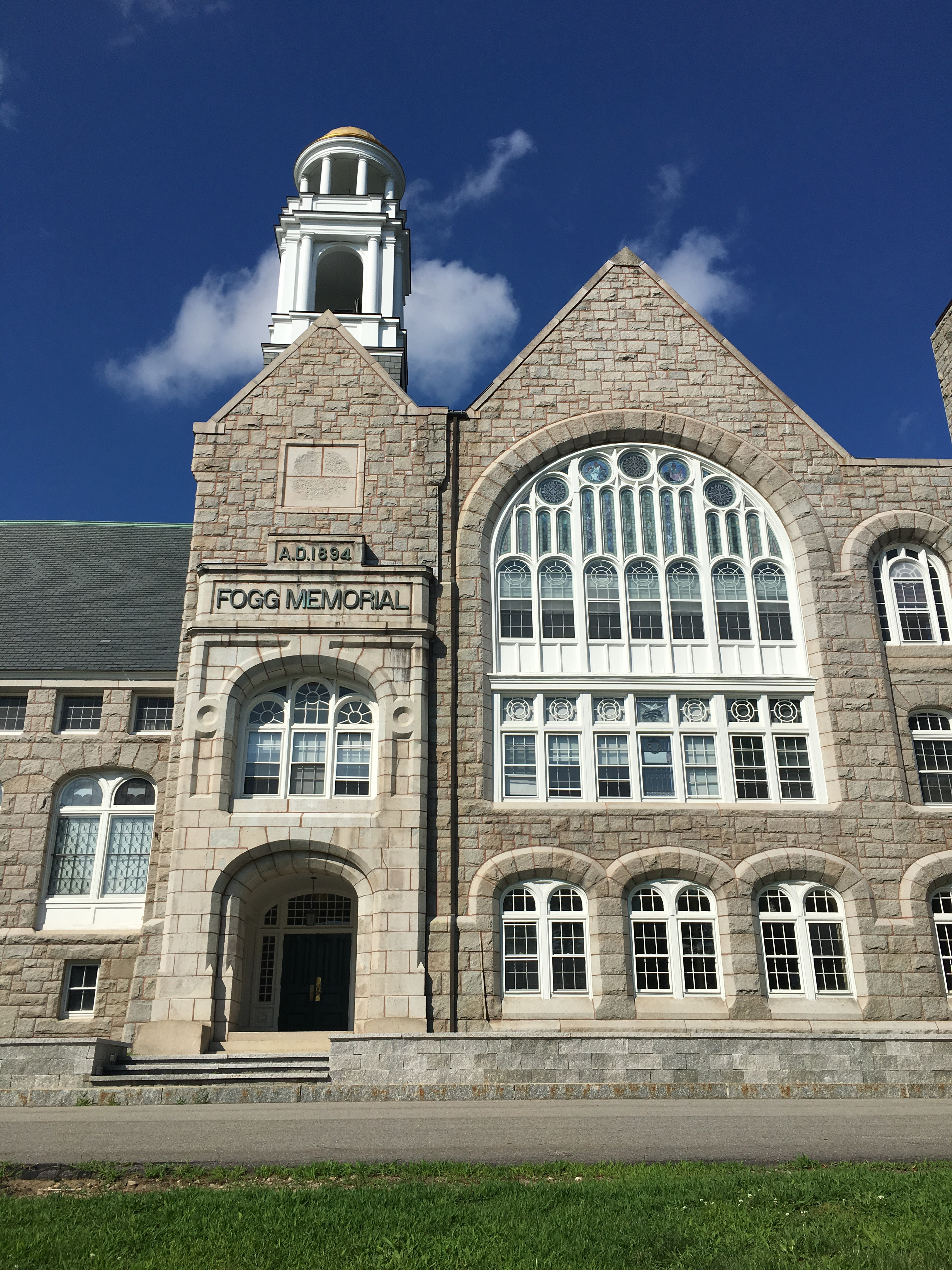 Fogg Memorial Building closeup, Berwick Academy, South Berwick, Maine